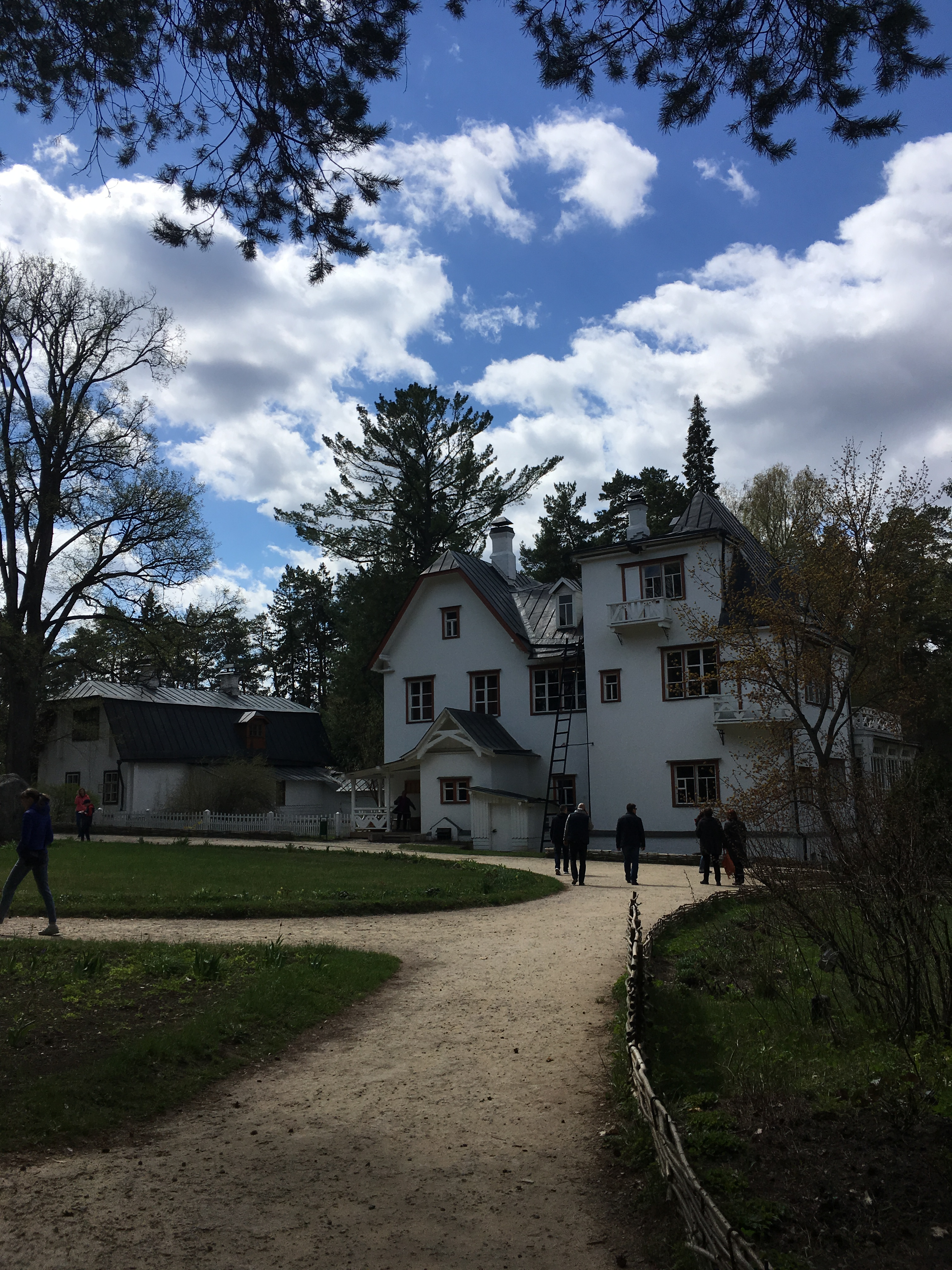 Зеленая зона музея-усадьбы В.Д. Поленова: ООПТ расположена на правом берегу р.Ока, с запада граница ООПТ проходит по правому берегу Оки до дома бакенщика, с севера - по границе гослесфонда (кв. 28), по дороге на Ланьшино, далее по южной окраине д.Митино, по ручью до 33 кв. Заокского лесхоза, с запада - по квартальным просекам между 33,32,34 кв., через 39 кв. по ручью Макавка до впадения ее в реку Скнижка, с юга - по северным границам 8,7,6 кв. Заокского лесхоза, затем по границе с Калужской обл. до р.Оки, д.Митино, Заокский район, Тульская область This image is related to the protected area of Russia number 7100037